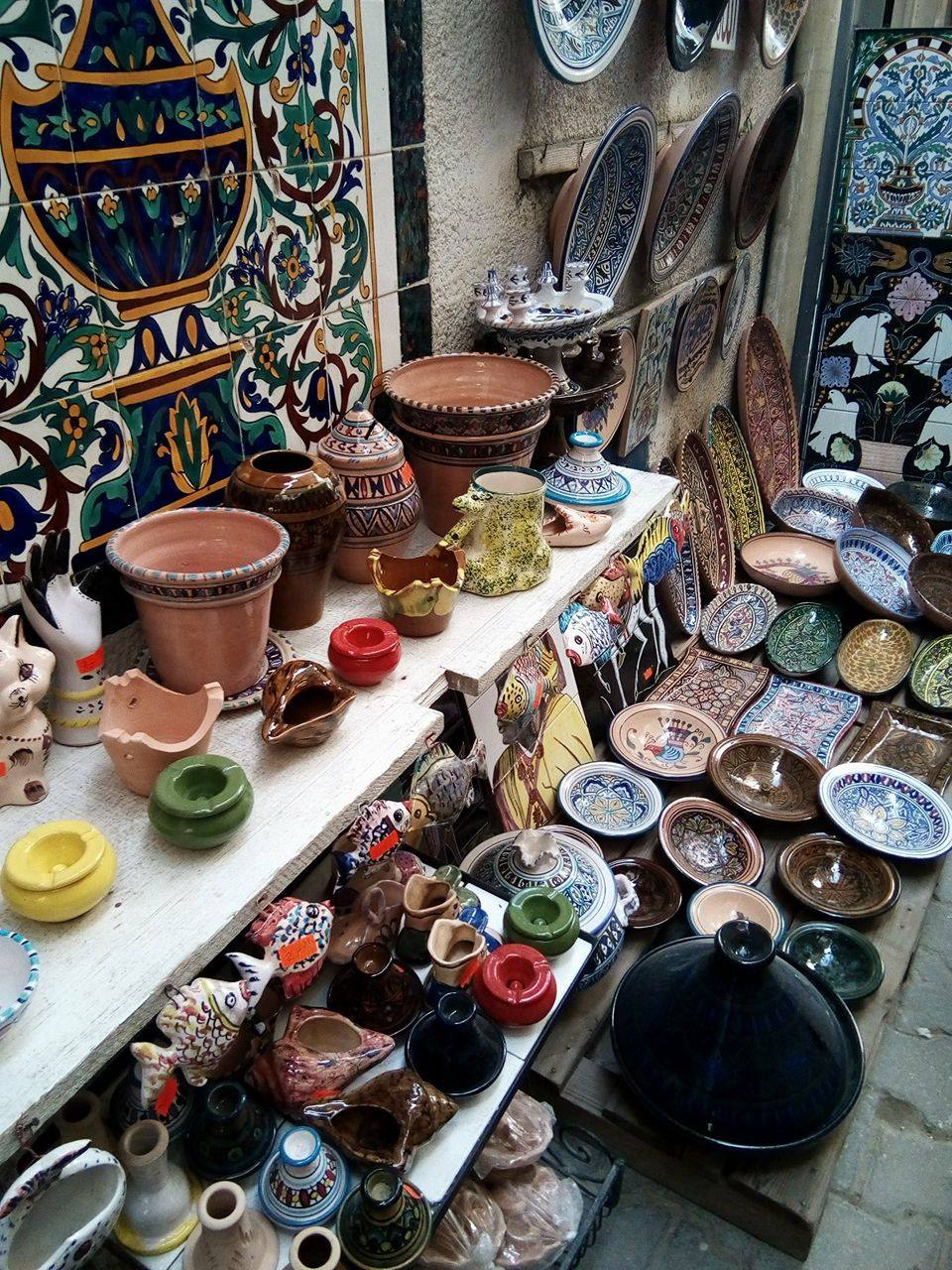 Céramique Tunisienne à la Médina-Tunis